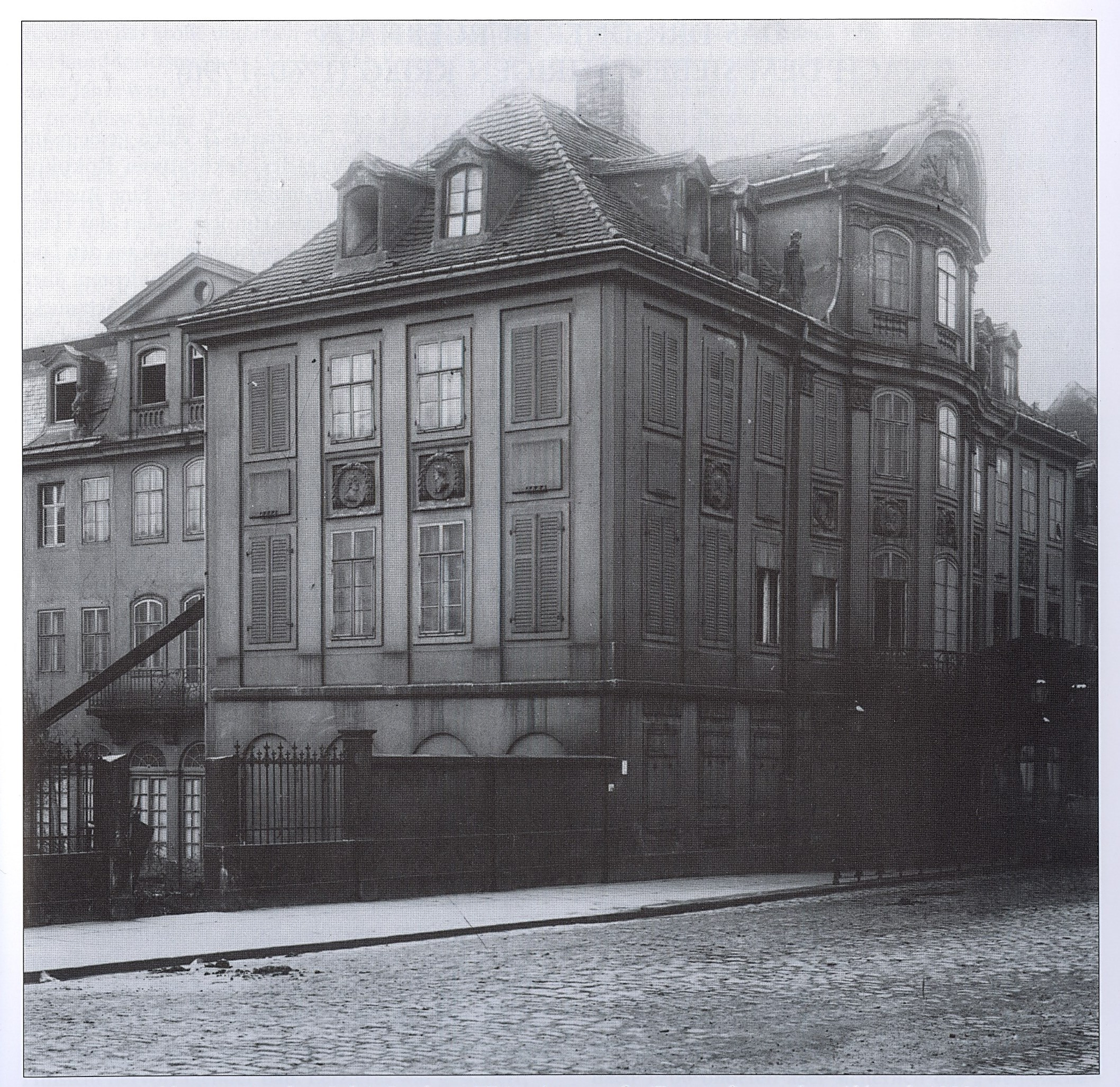 Palais Boxberg, Waisenhausstraße Dresden, vor dem Abbruch 1899